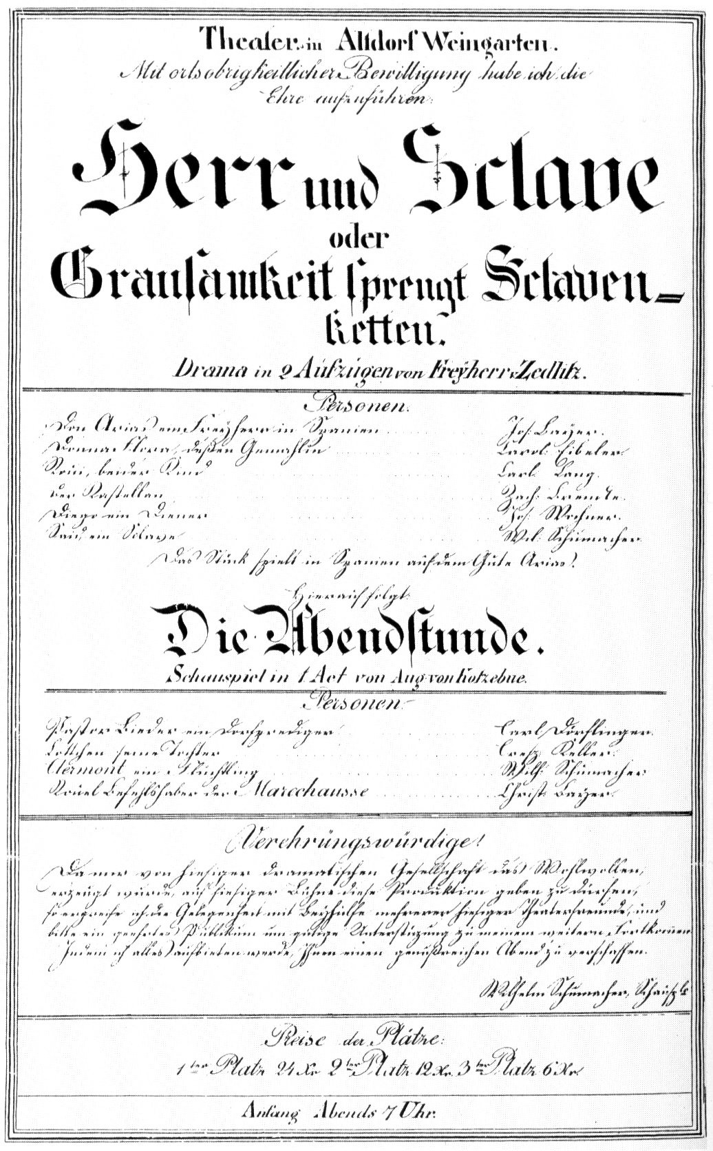 Theaterzettel zur Aufführung des Schauspiels Herr und Sclave oder Grausamkeit sprengt Sclavenketten von Joseph Christian Freiherr von Zedlitz gefolgt von Die Abendstunde von August von Kotzebue; in Altdorf-Weingarten (Württemberg), zwischen 1840 und 1845; unter den Laiendarstellern auch Joseph Bayer (Lithograph)